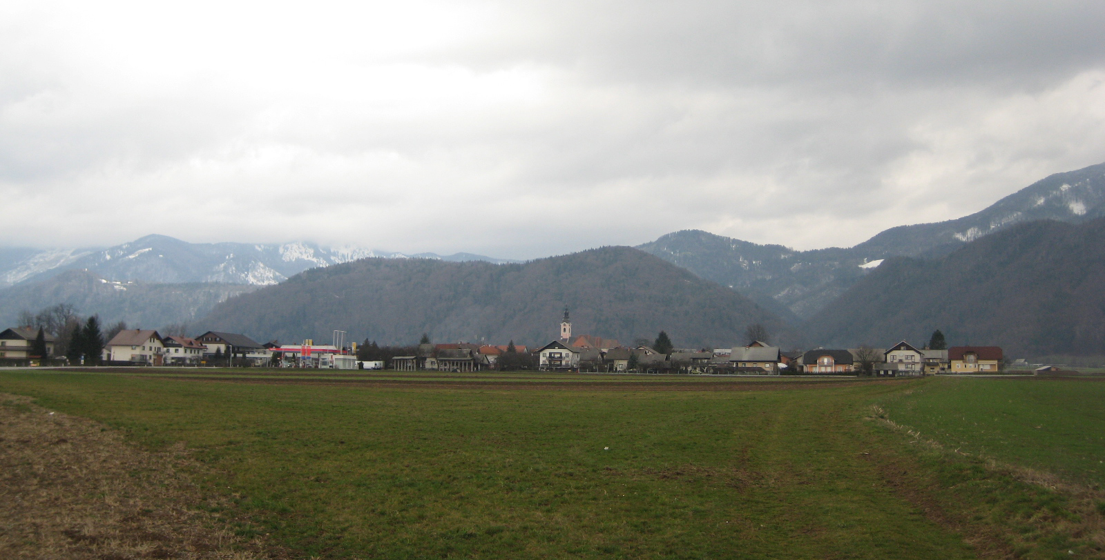 Cerklje, town in Slovenia (Gorenjska)